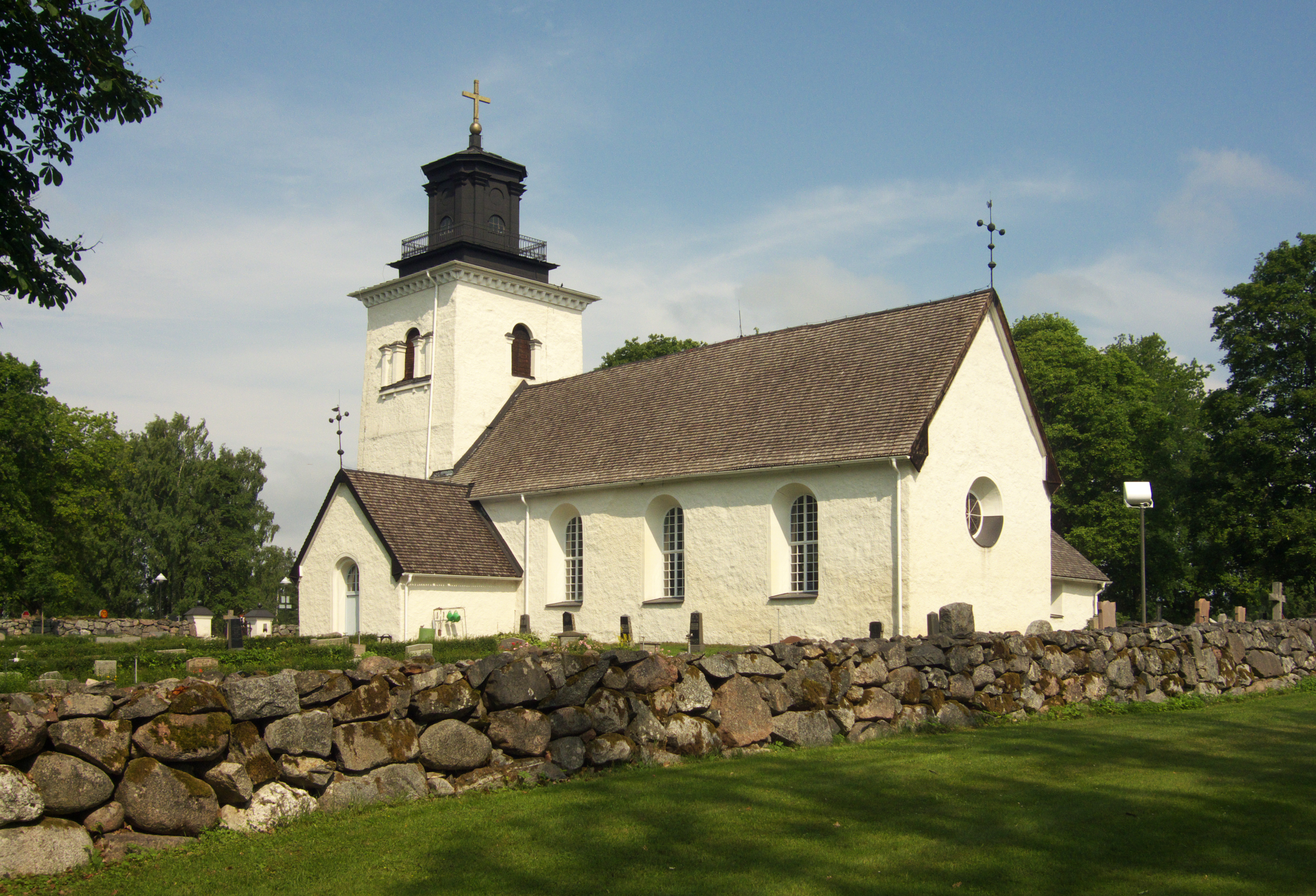 Övergrans kyrka